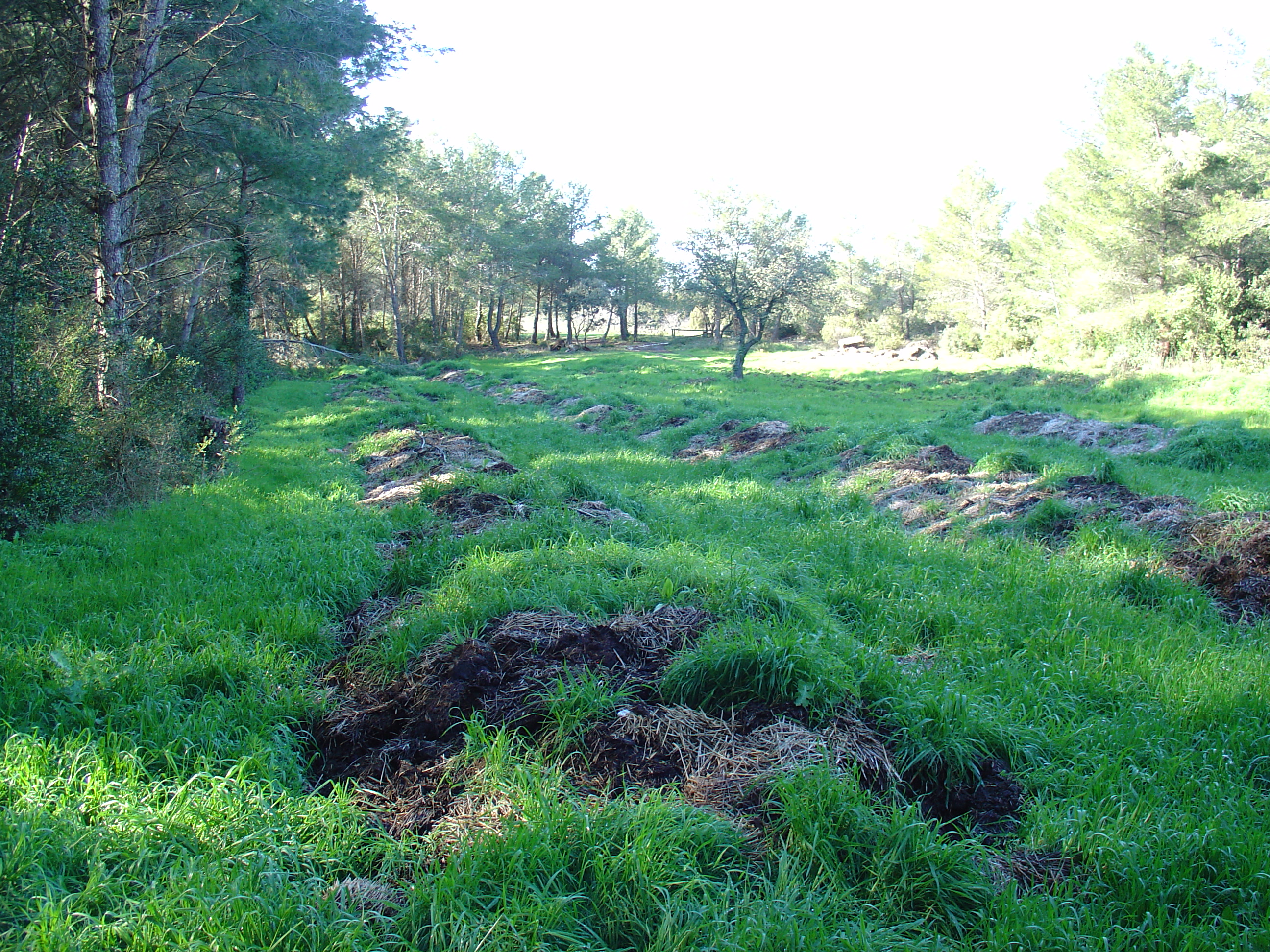 Compostage en andain - Château Romanin, Baux de Provence. France